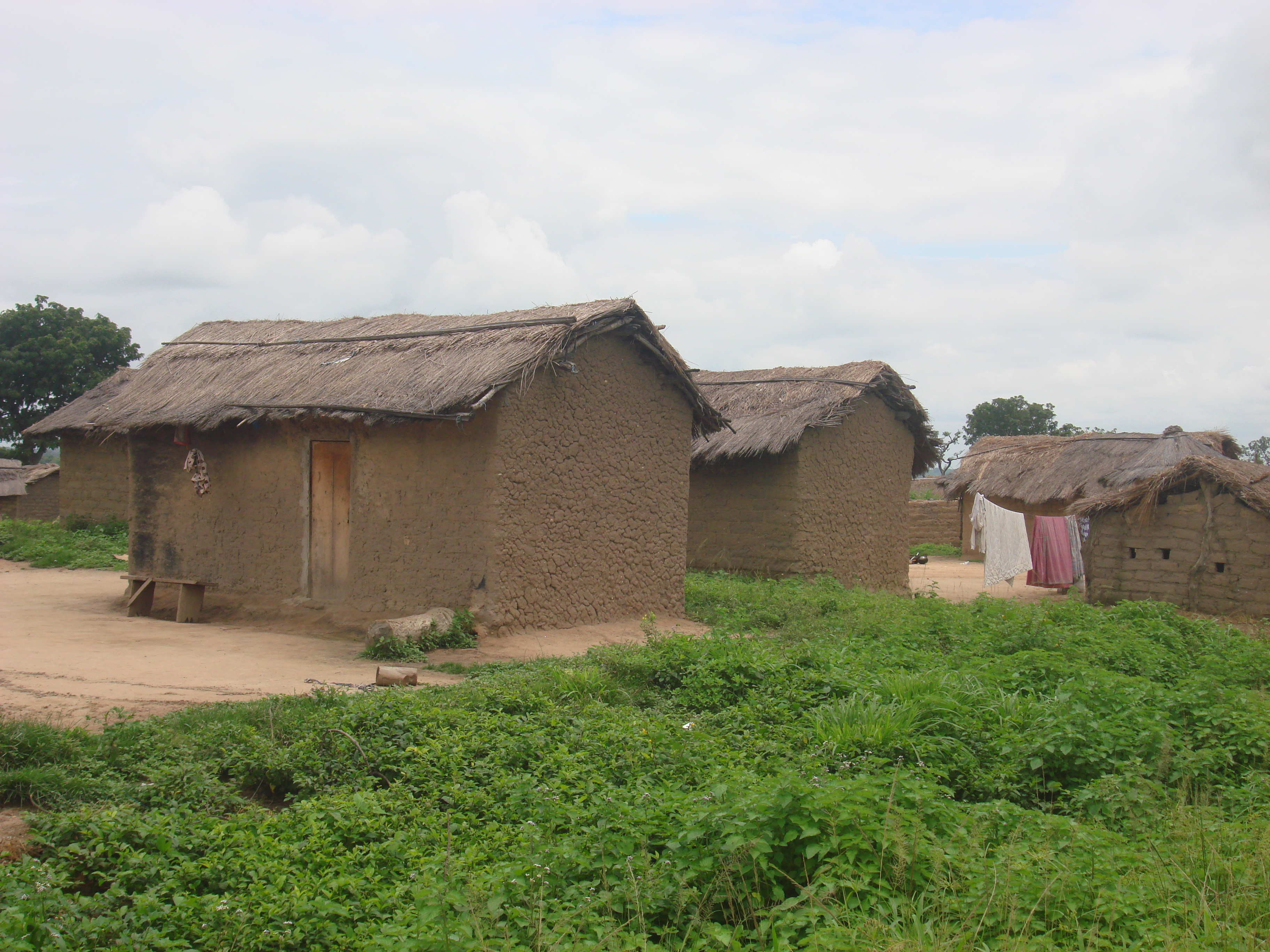 Cases rectangulaires traditionnelles du village de Nawokaha dans la région des Savanes (Korhogo), Côte d'Ivoire.